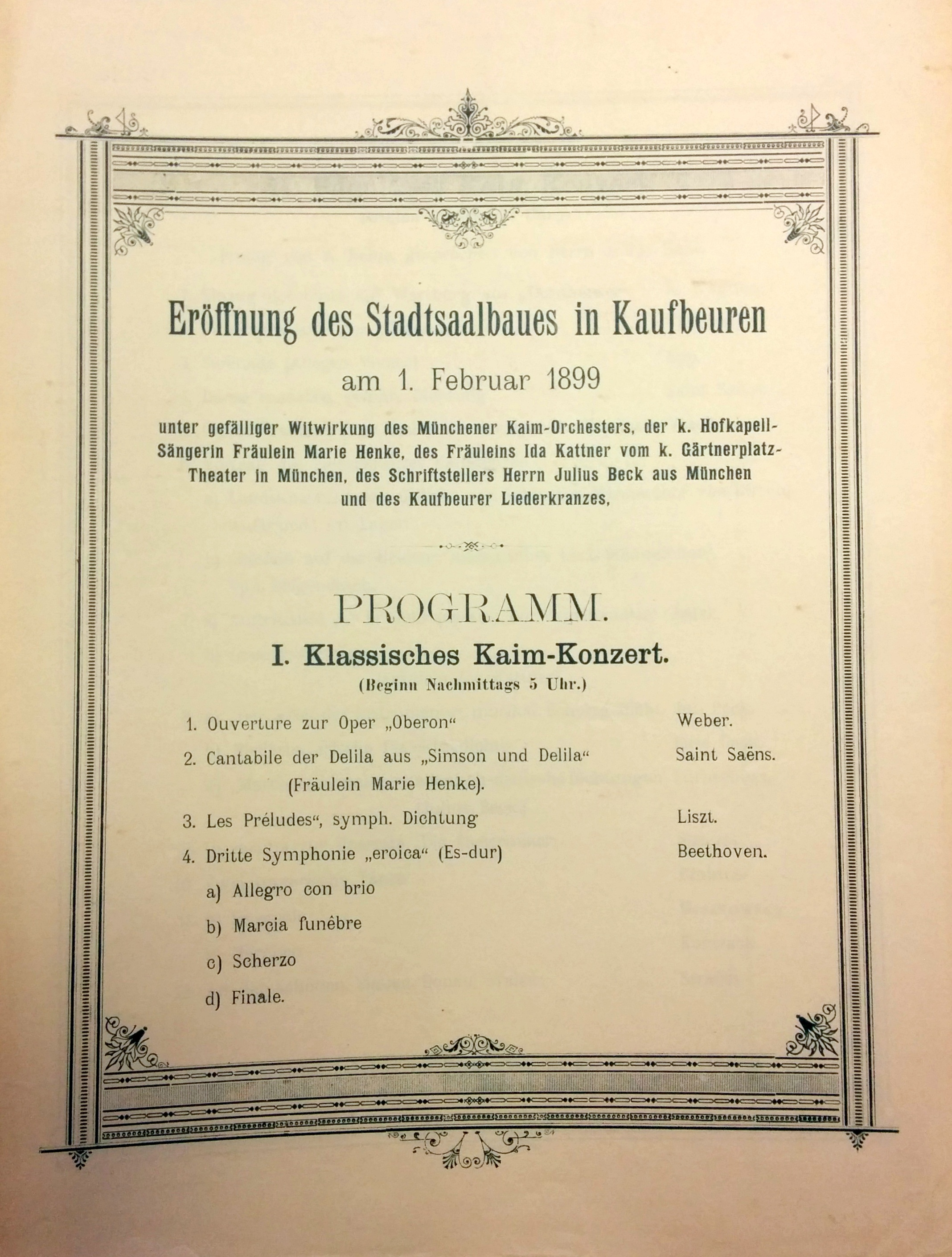 Blatt 1 des Programms (klassisches Kaim-Konzert) anlässlich der Stadtsaaleröffnung Kaufbeuren, Mitwirkende neben dem großen Kaim-Orchester: Schriftsteller Julius Beck aus München, Hofkapellsängerin Marie Henke, Ida Kattner v. Gärtnerplatztheater München und des Kaufbeurer Liederkranzes